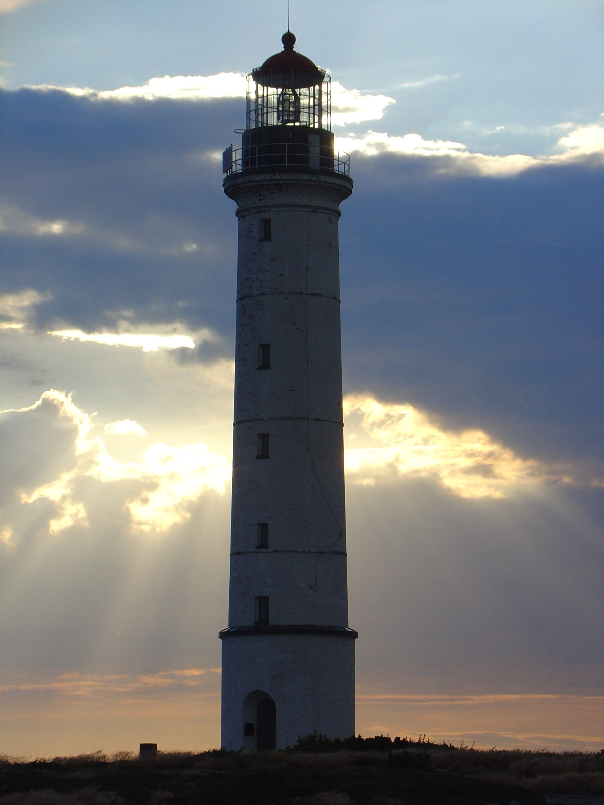 Sälskärs fyr